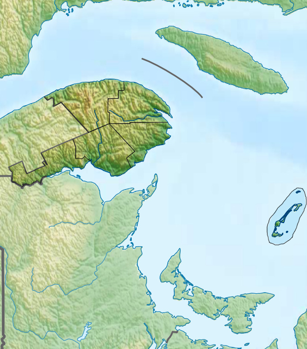 Carte topographique de la région administrative de la Gaspésie–Îles-de-la-Madeleine.